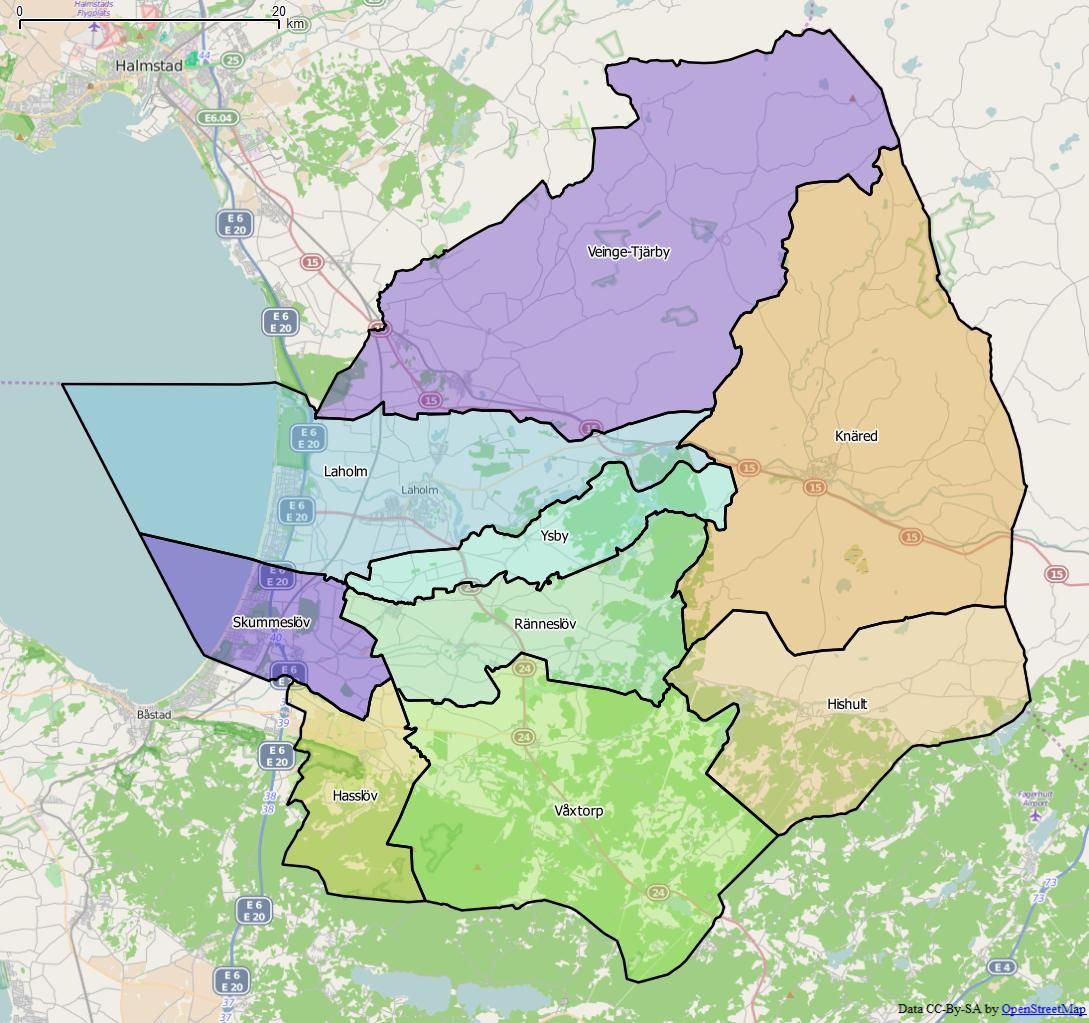 Distriktsindelningen i Kristinehamns kommun World file: 76.99876056176738359 0 0 -76.99876056176738359 1419856.56188056874088943 7698823.87368463538587093